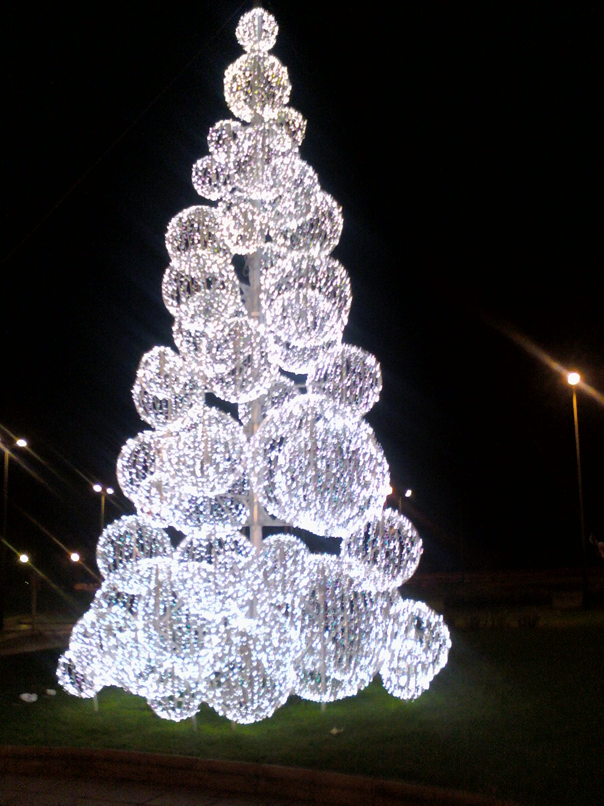 Árbol de navidad en Las Palmas de Gran Canaria